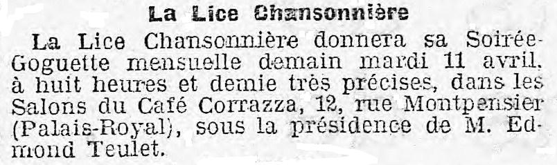 Annonce de la Soirée-Goguette mensuelle de la Lice chansonnière le 11 avril 1911.